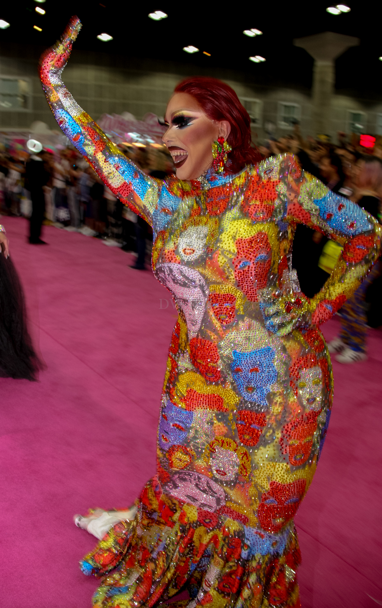 Rupaul DragCon 2019 - Los Angeles